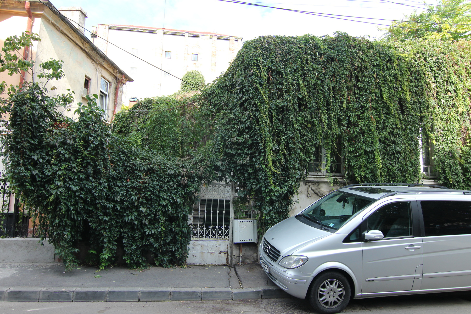 Casă pe Stelea Spătarul